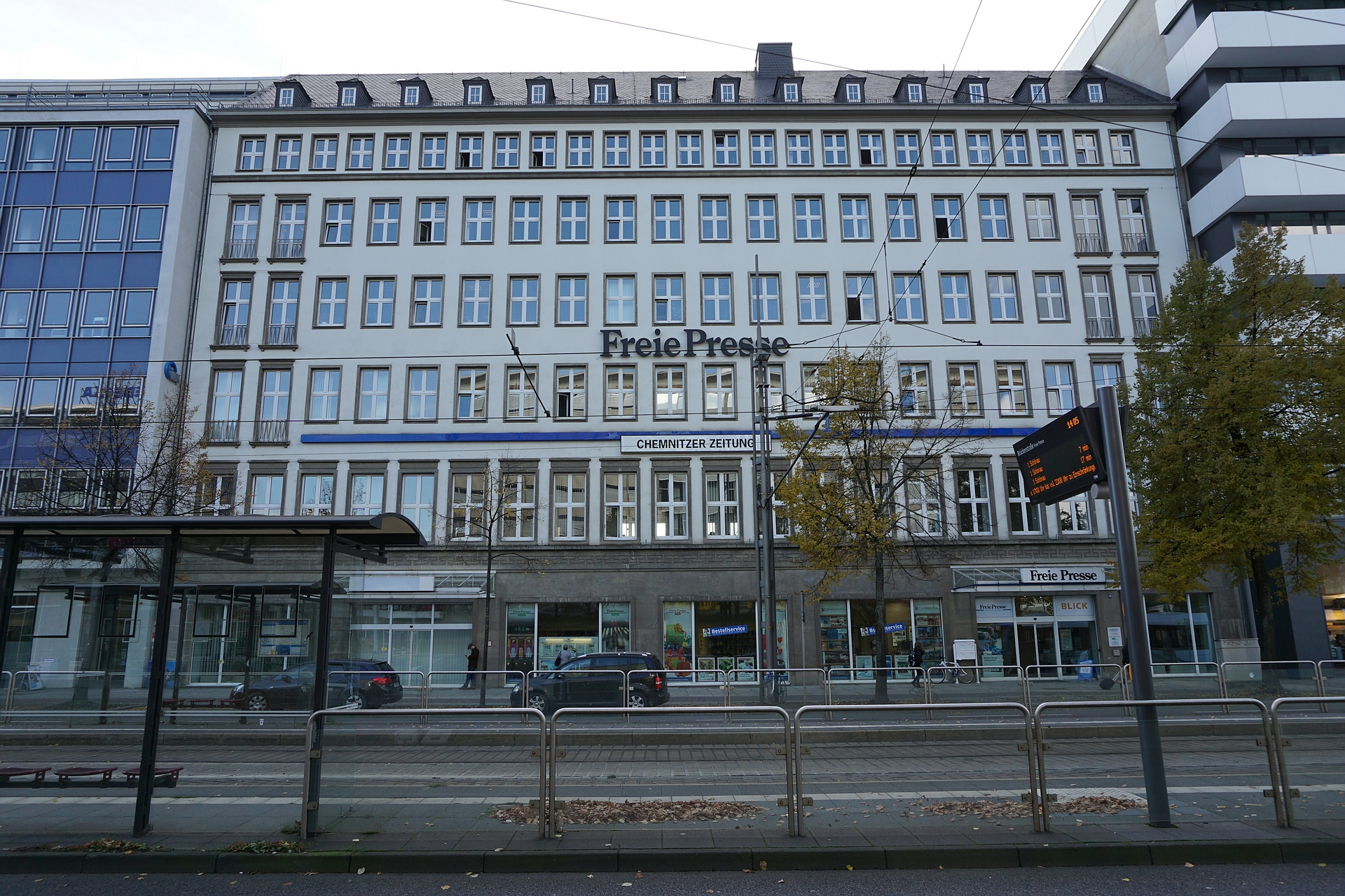 Das Verlagsgebäude der Chemnitzer Tageszeitung "Freie Presse" an der Brückenstraße